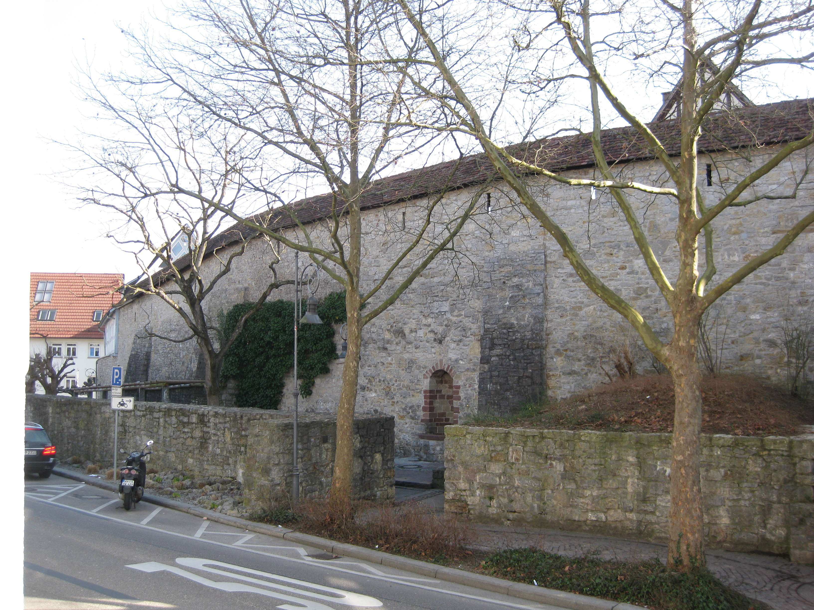 Waiblingen Stadtmauer beim Hochwachtturm 2017